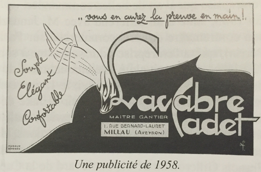 Publicité